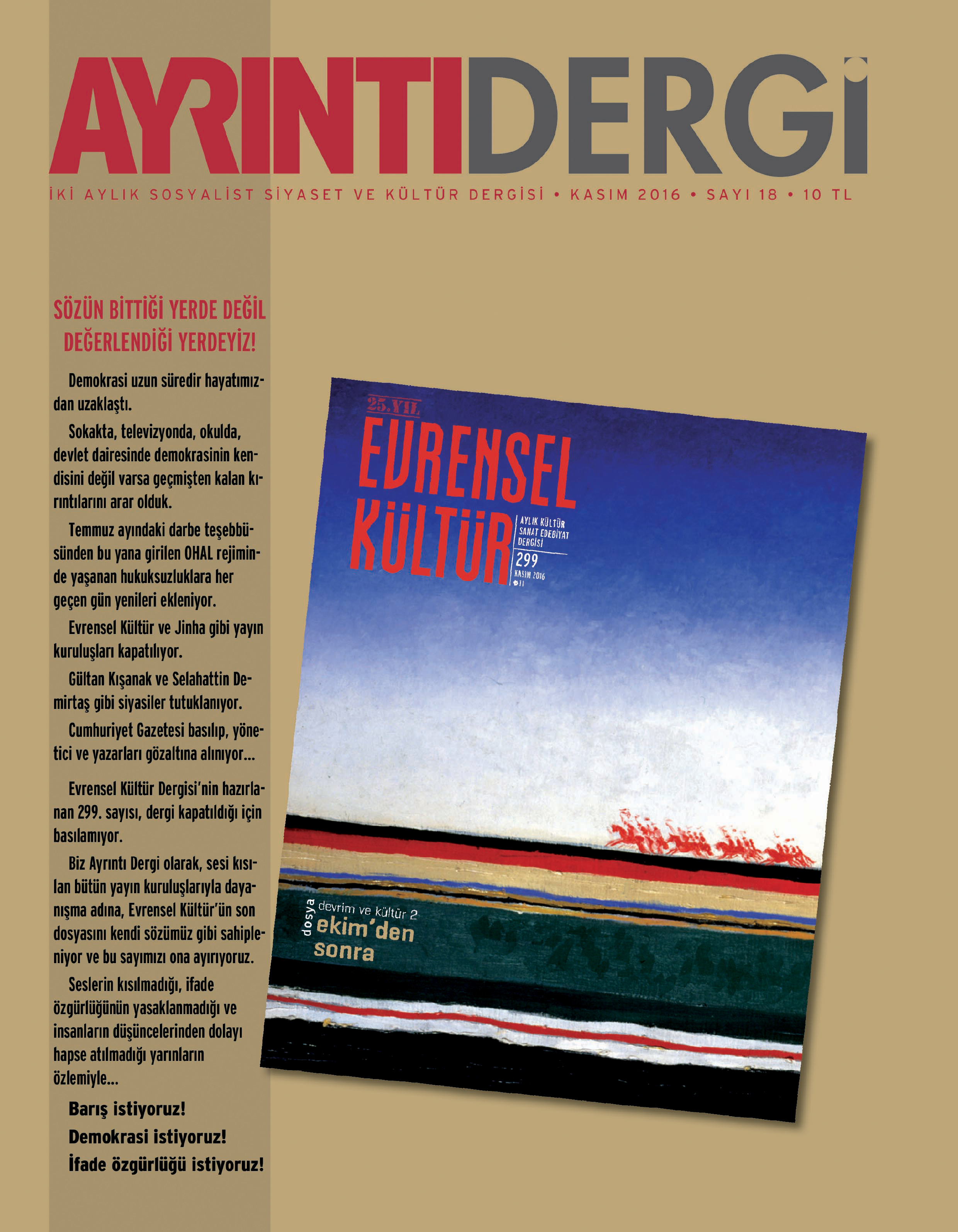 Ayrıntı Dergi Sayı 18